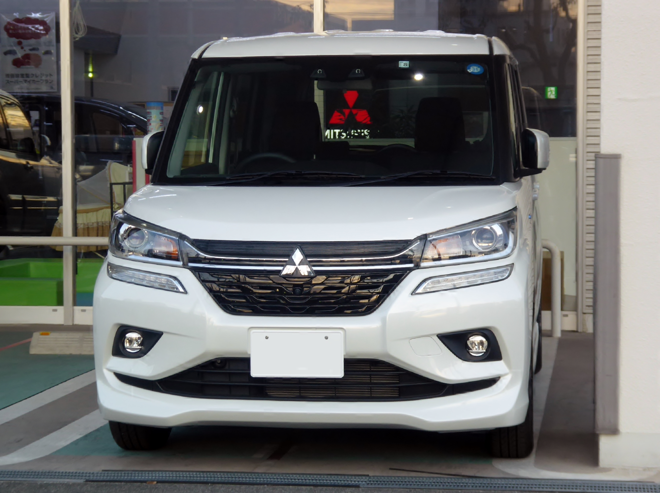 DAA-MB36S-MSVBRM型三菱・デリカD:2カスタムHYBRID MVをフロントから撮影。